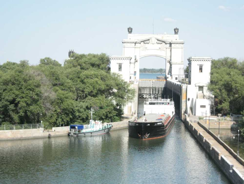 Волго-Донской судоходный канал им. В.И. Ленина. Шлюз № 14